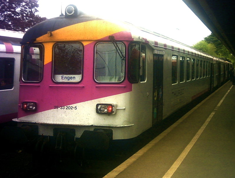 THURBO-Zug 28-33 202-5 nach Engen in Radolfzell